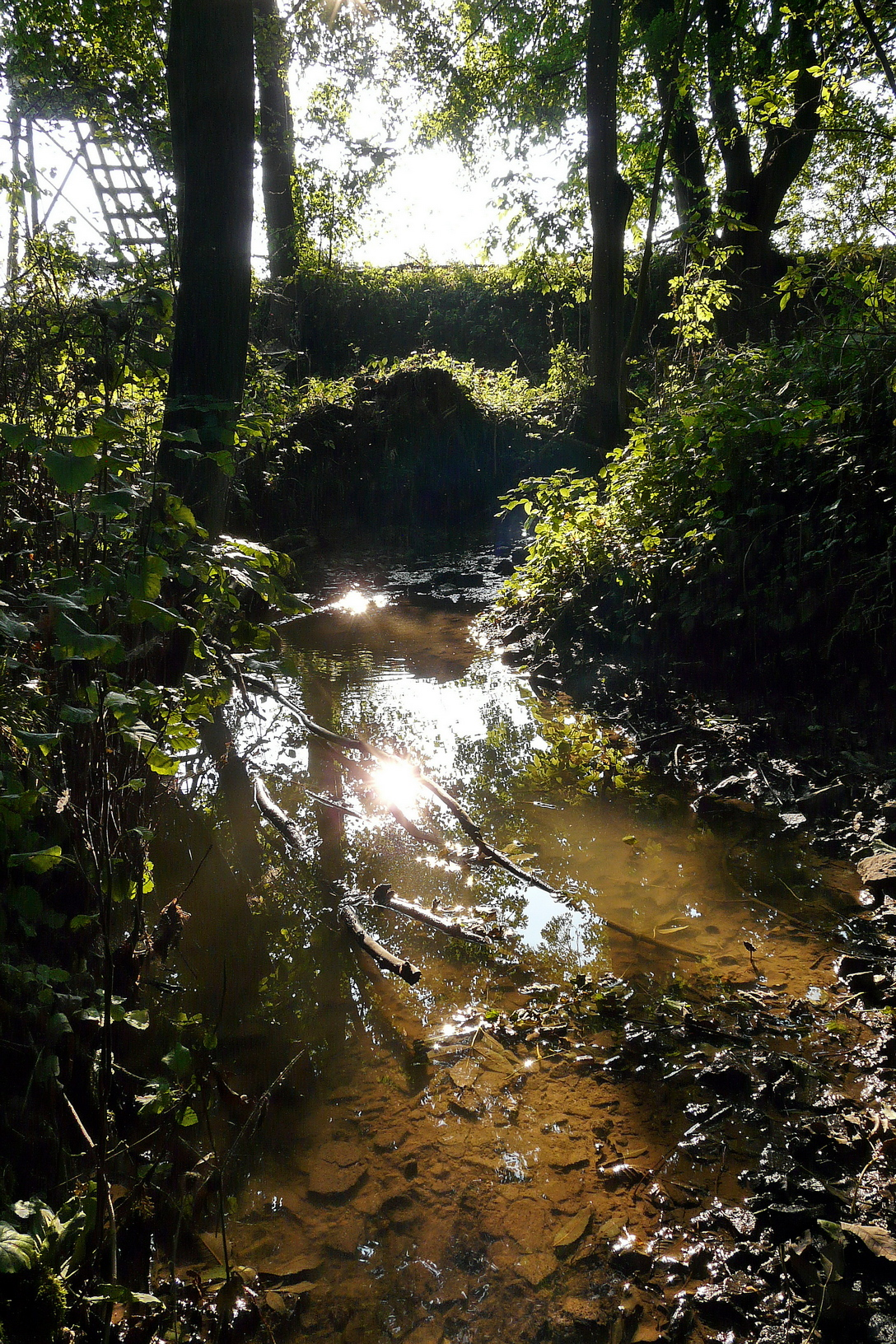 Malý Porák